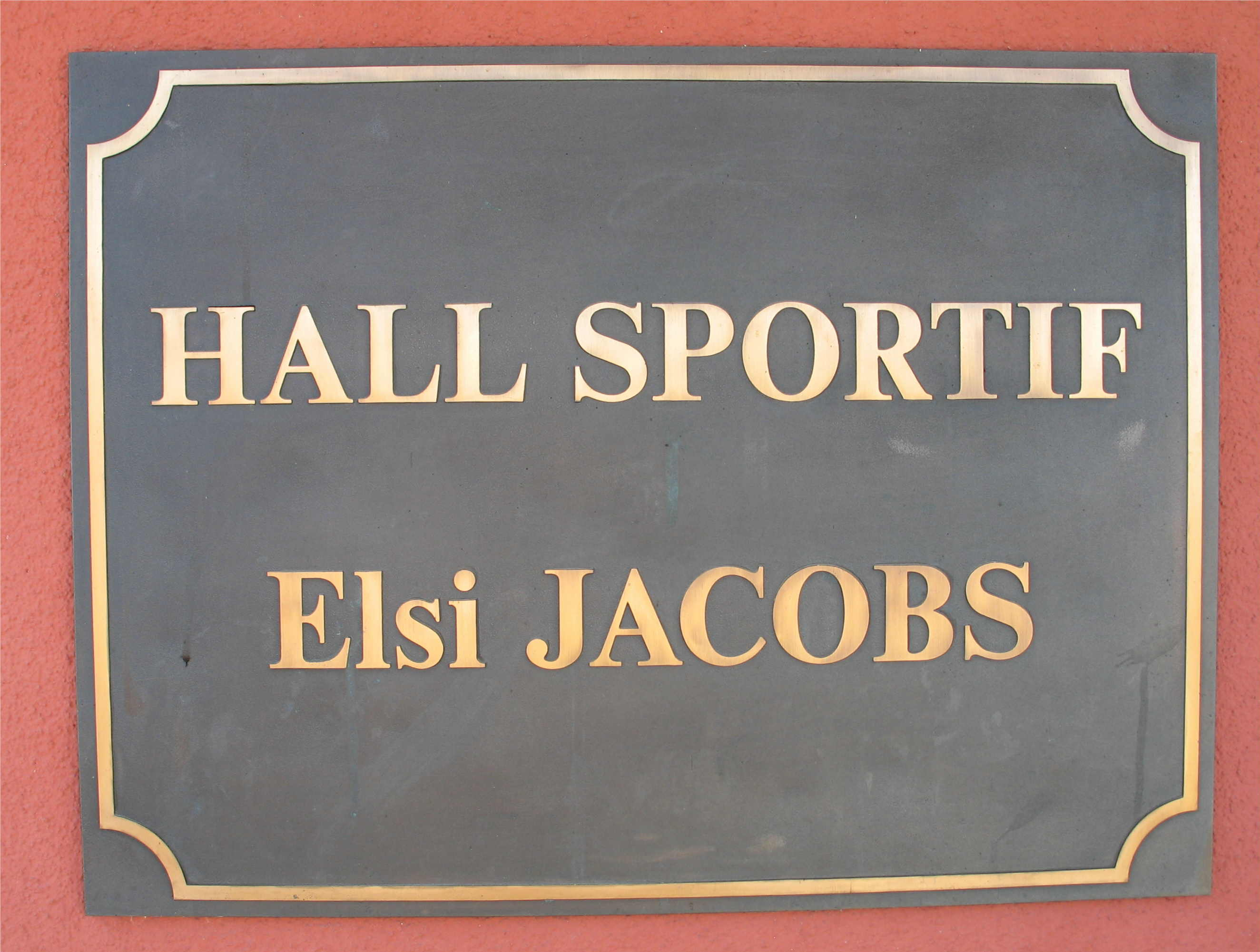 Schëld op der Sportshal zu Garnech